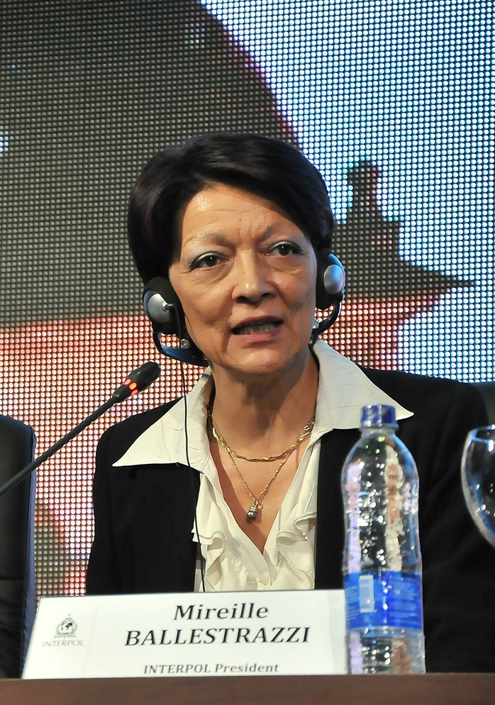 Mireille Ballestrazzi, Asamblea 82 de Interpol, Cartagena, Colombia